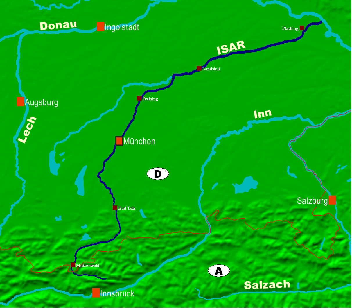 Zusehen ist die Lage des Flusses Isar in Südbayern